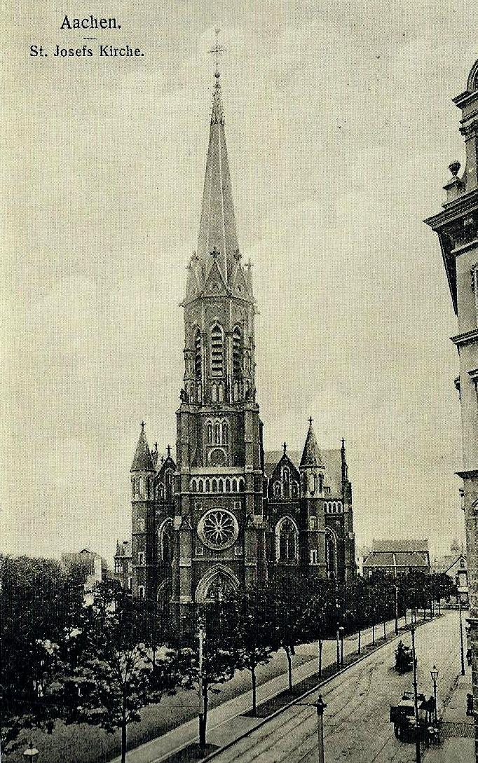 Scan einer alten Postkarte von St. Josef in Aachen um 1919